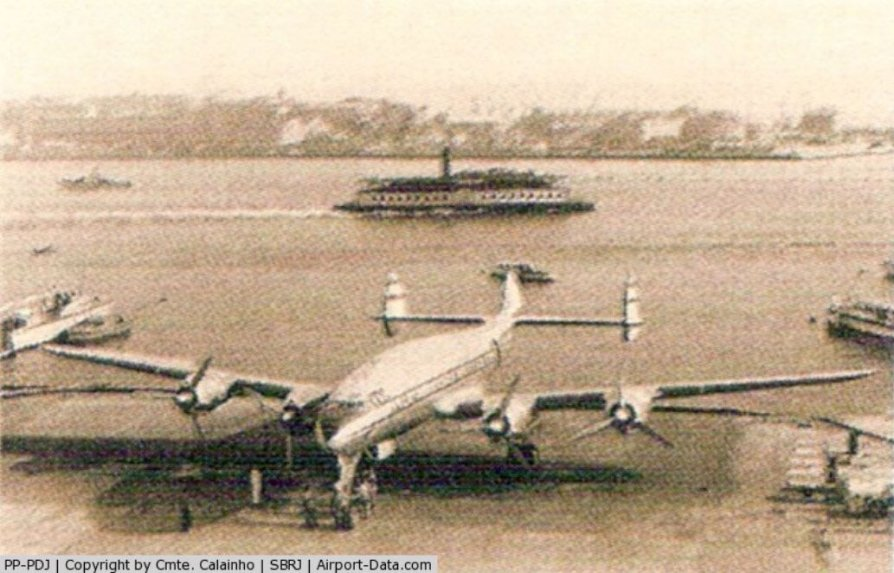 El avión accidentado, en Rio de Janeiro